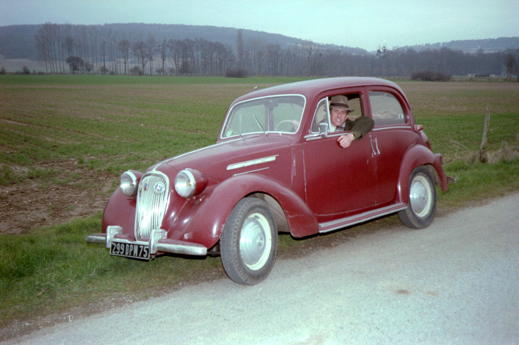 Simca 8 1200 (1950-1951).